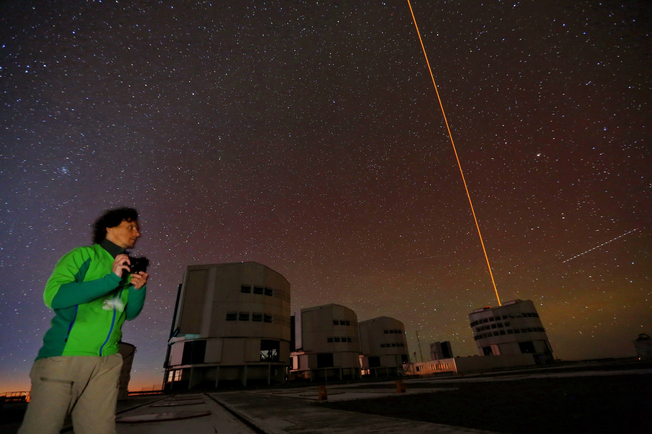 Foto di Luca Bracali